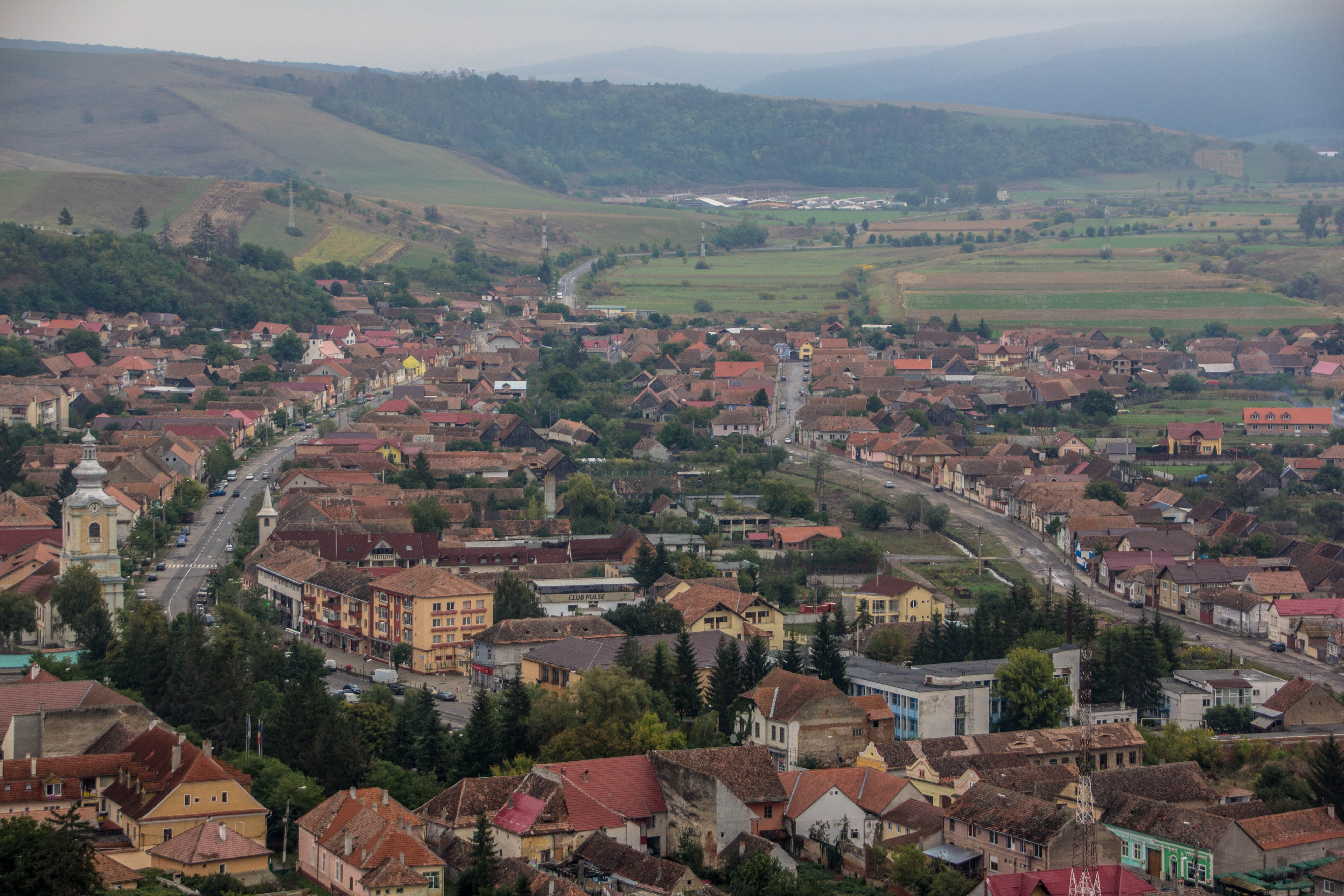 Cetatea Rupea (Cetatea Cohalmului)